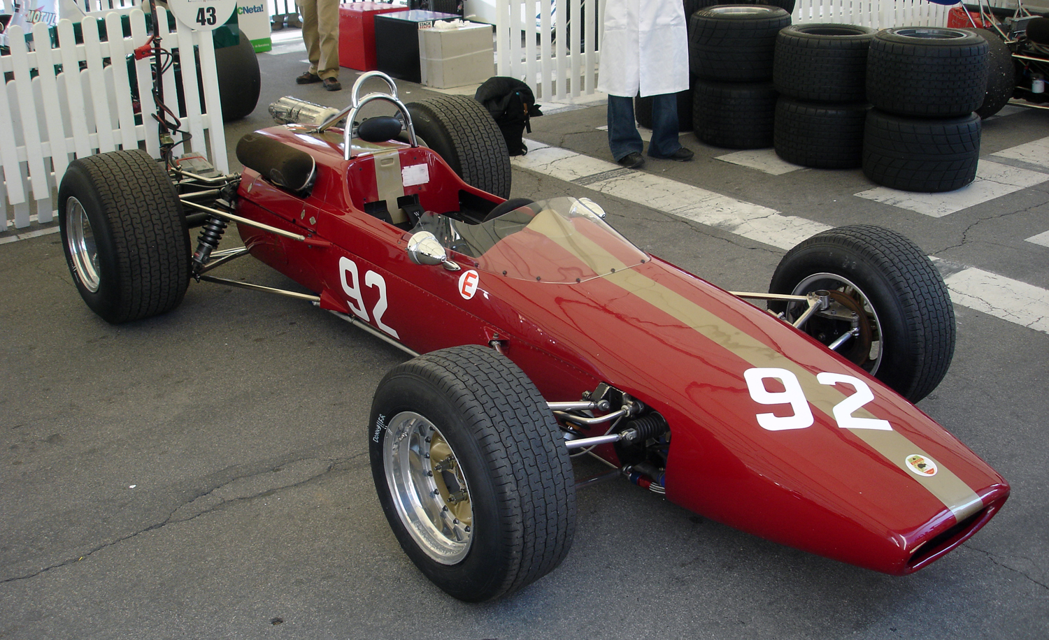 McLaren M4A, exposat al festival Martini Legends (commemoració del 75 aniversari del Circuit de Montjuïc)